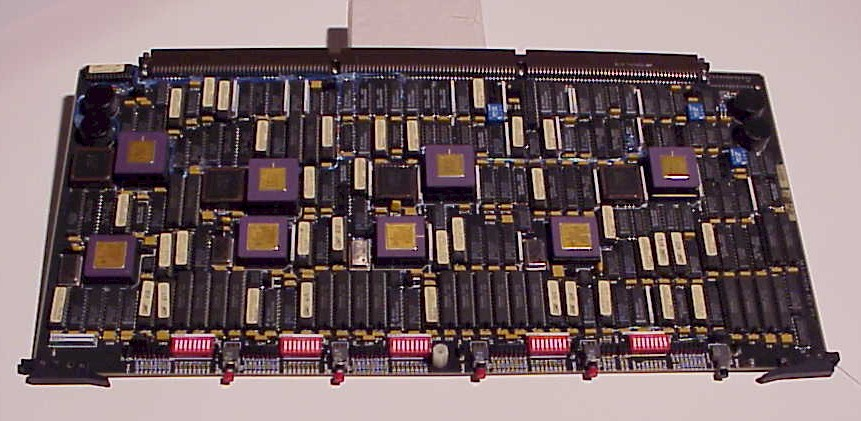 QDAP Board, circa 1987